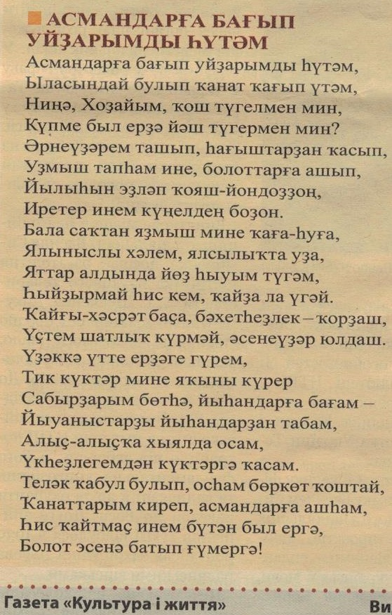 Пер. стиха Т. Шевченко на башкирский язык Г. Ситдыковой. "Культура і життя", 2015, №49-52